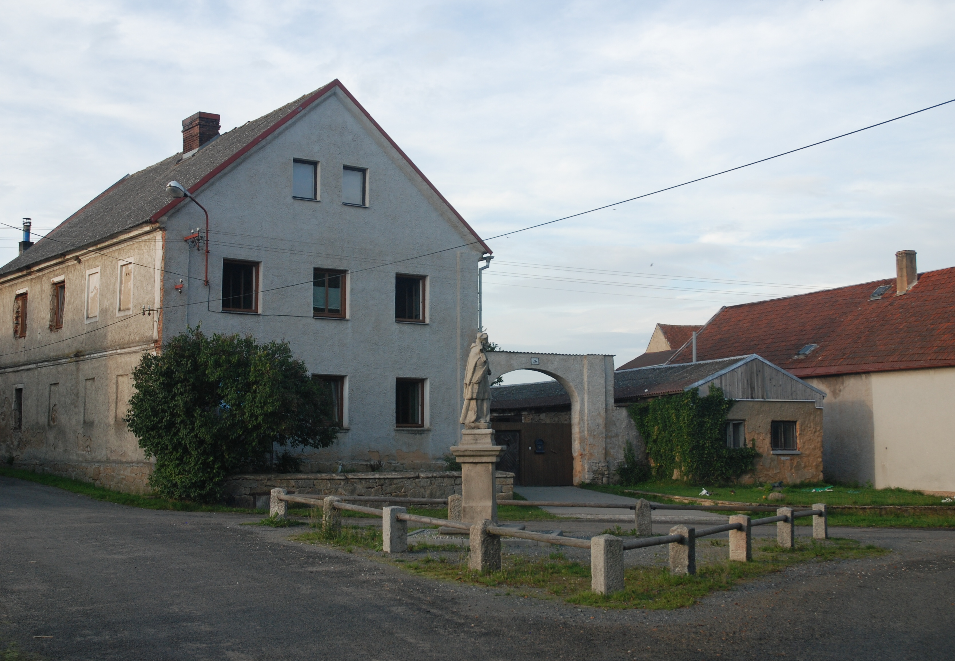 Nahý Újezdec